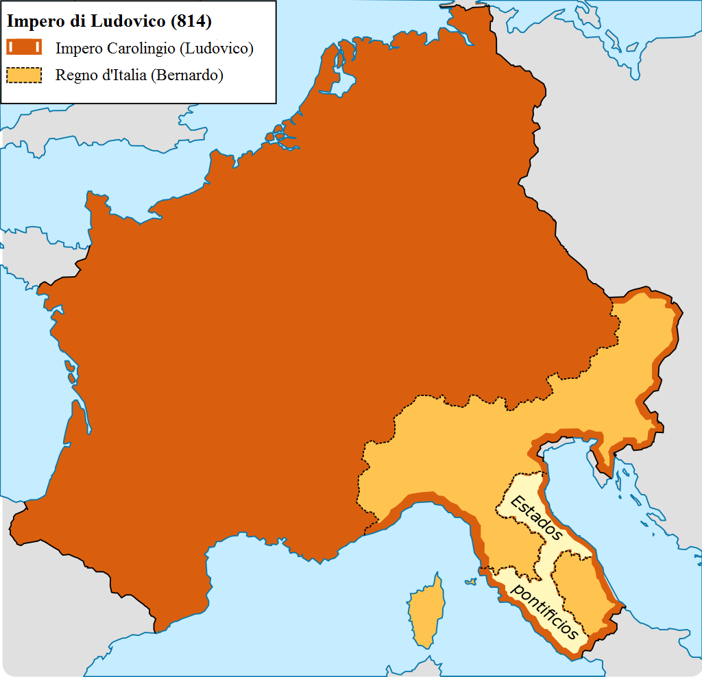 L'impero carolingio al momento dell'ascesa di Ludovico il Pio (814)